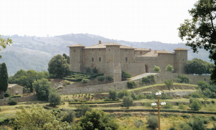 descrizione: veduta del Castello di Montepò nei dintorni di Scansano (GR) lavoro personale di Vinattieri Matteo (27/01/2007 con foto scattata nel luglio 2005 da apparecchio non digitale e rielaborata successivamente) che lascia in pubblico dominio